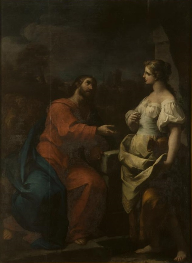 La obra representa a Jesucristo junto a la mujer samaritana en el pozo.